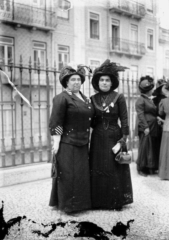 «A Sr.ª D. Carolina Beatriz Ângelo, a primeira eleitora portuguesa, acompanhada pela Sr.ª D. Ana de Castro Osório, presidente da Liga das Sufragistas Portuguesas.» Imagem integrada na reportagem “Estão eleitas as constituintes: a eleição em Lisboa”. Empresa Pública do Jornal O Século, Joshua Benoliel, lote 08, cx. 04, negativo 05. IIustração Portuguesa. Lisboa: Empresa do Jornal O Século. N.º 276 (05/06/1911), p. 714.